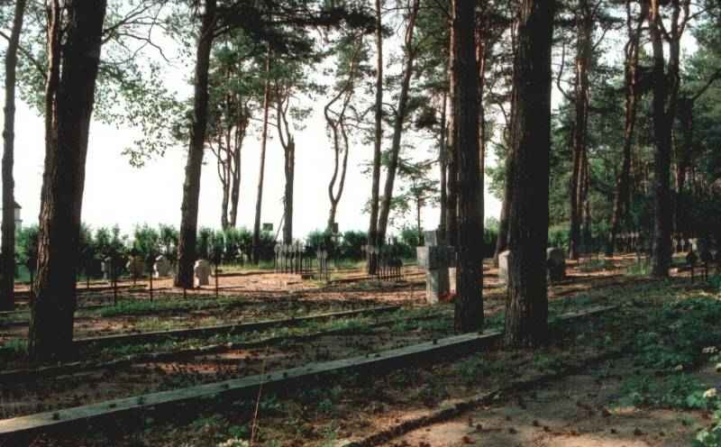 Cmentarz w Kotowicach z I wojny światowej